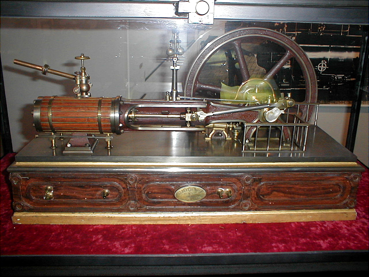 Reproduction d'une machine à vapeur (verso)